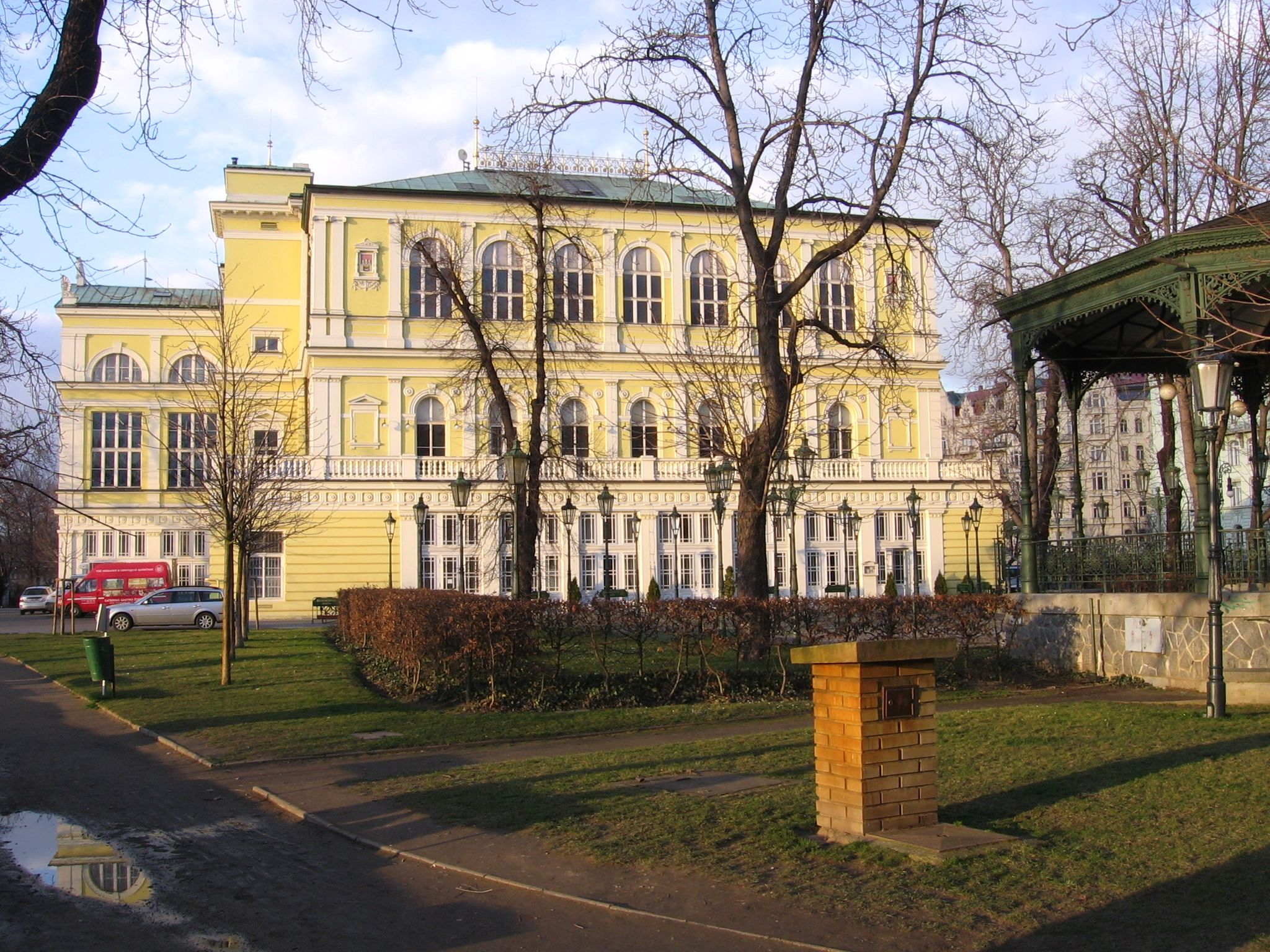 Hlavní budova na Slovanském ostrově (pohled od jihu)